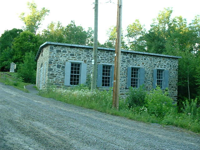 Annexe de l'ancienne centrale de Saint-Narcisse, à Saint-Narcisse (Québec) Canada